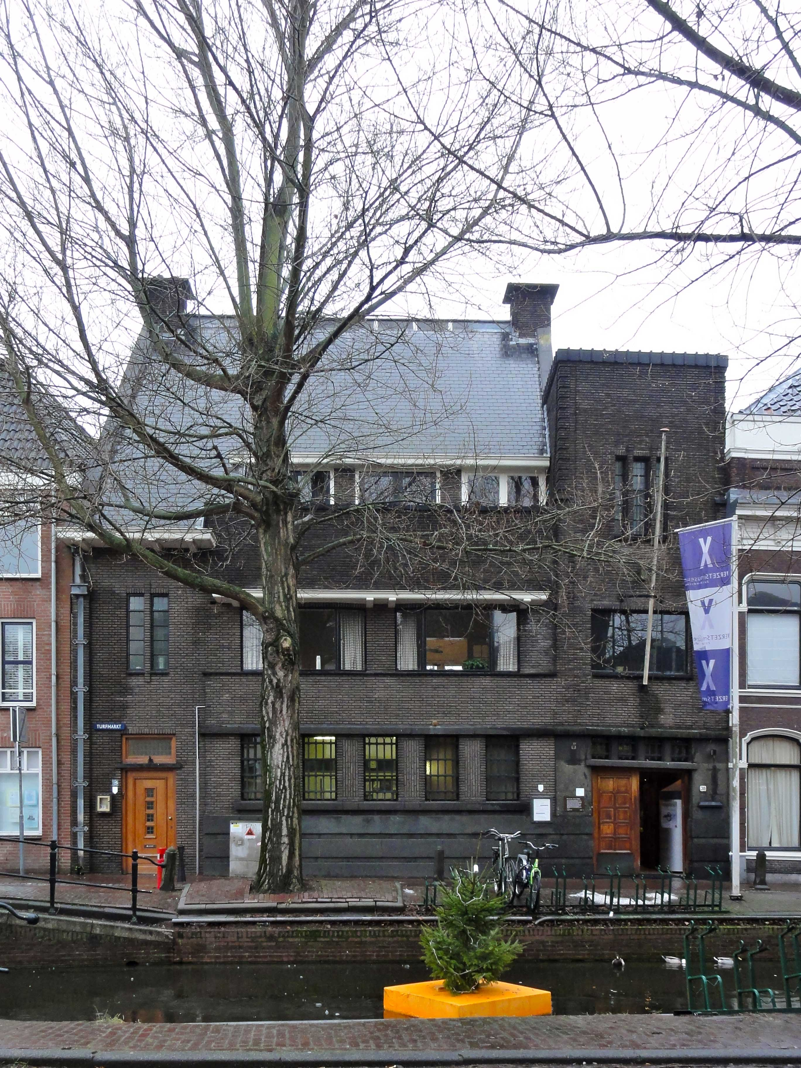 Voormalig bankgebouw van Knox en Dortland aan de Turfmarkt te Gouda en voormalige vestiging van Verzetsmuseum Zuid-Holland